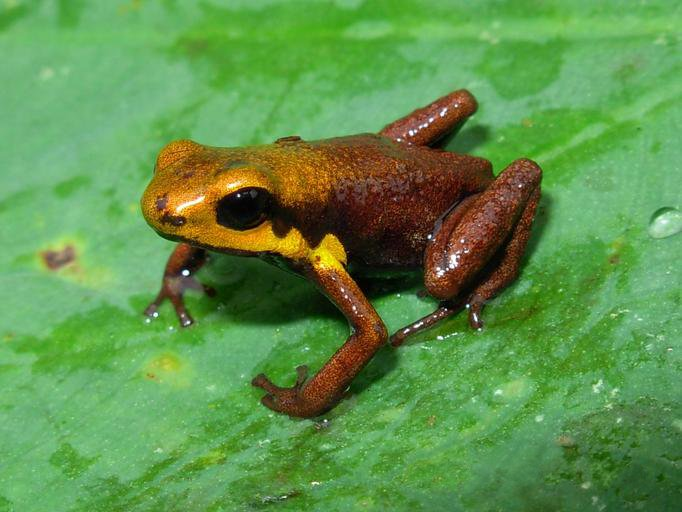 Ranitomeya tolimense